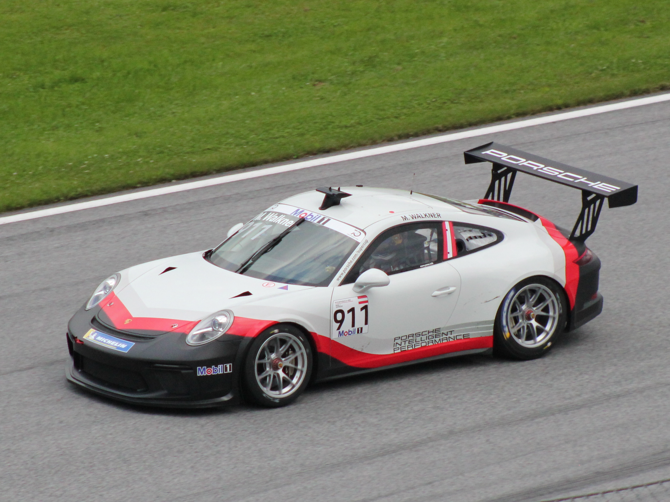 911 Matthias Walkner beim Rennwochenende in Österreich 2018